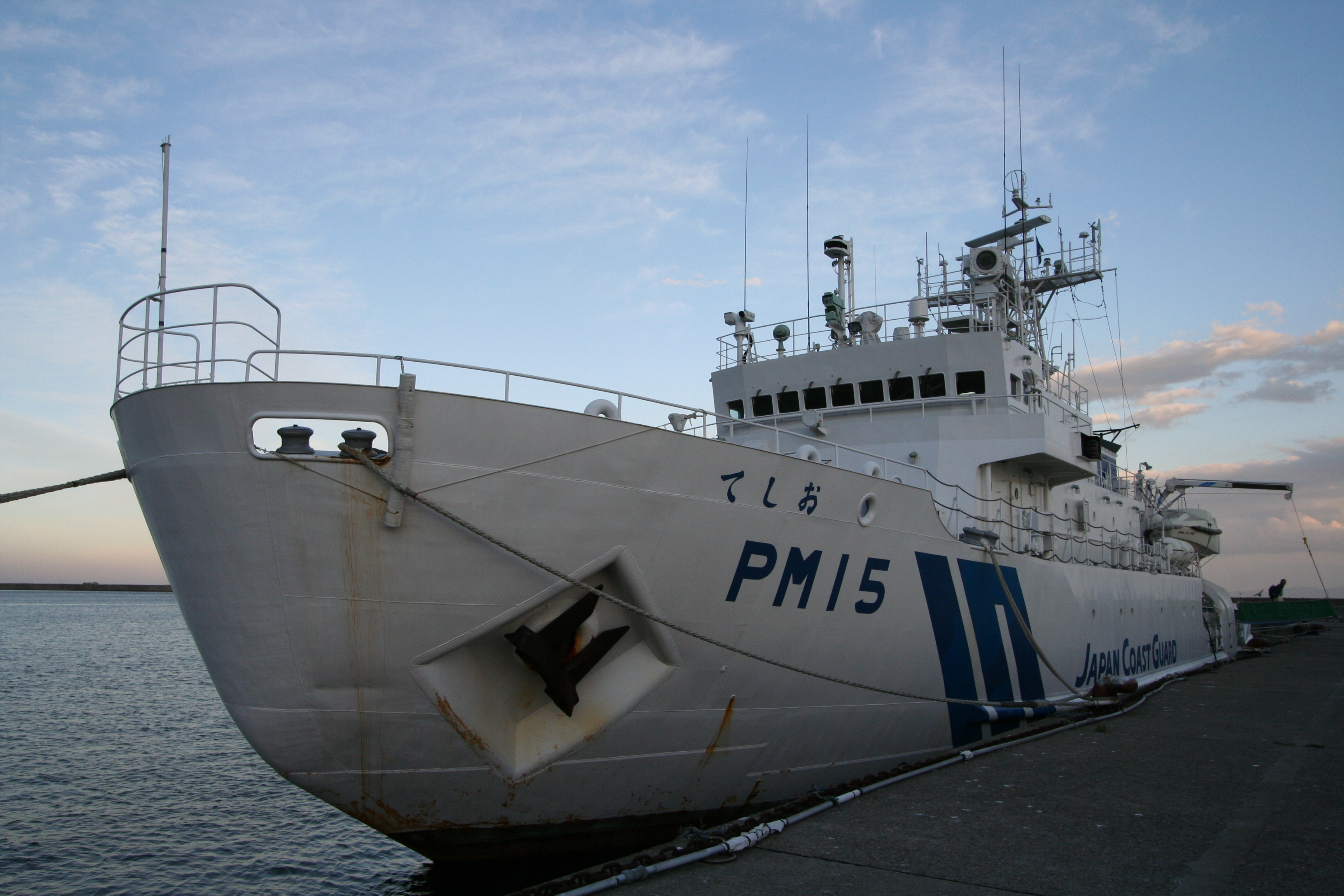 海上保安庁巡視船 PM15てしお 羅臼にて